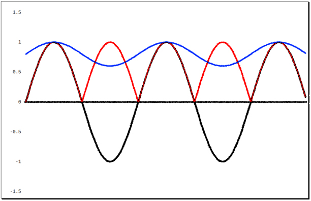 Схема АЦ/ДЦ/Пульс